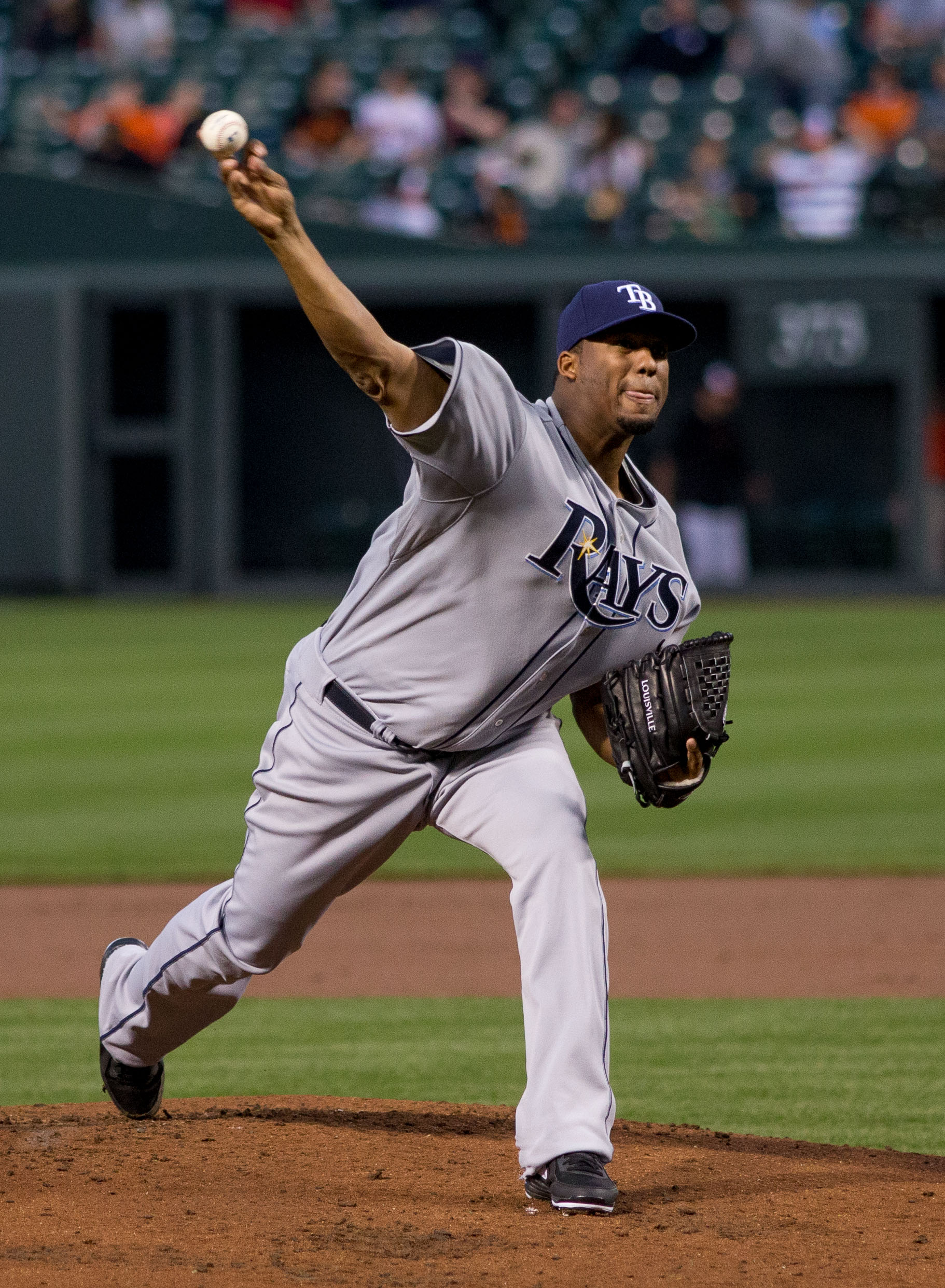 Roberto Hernández